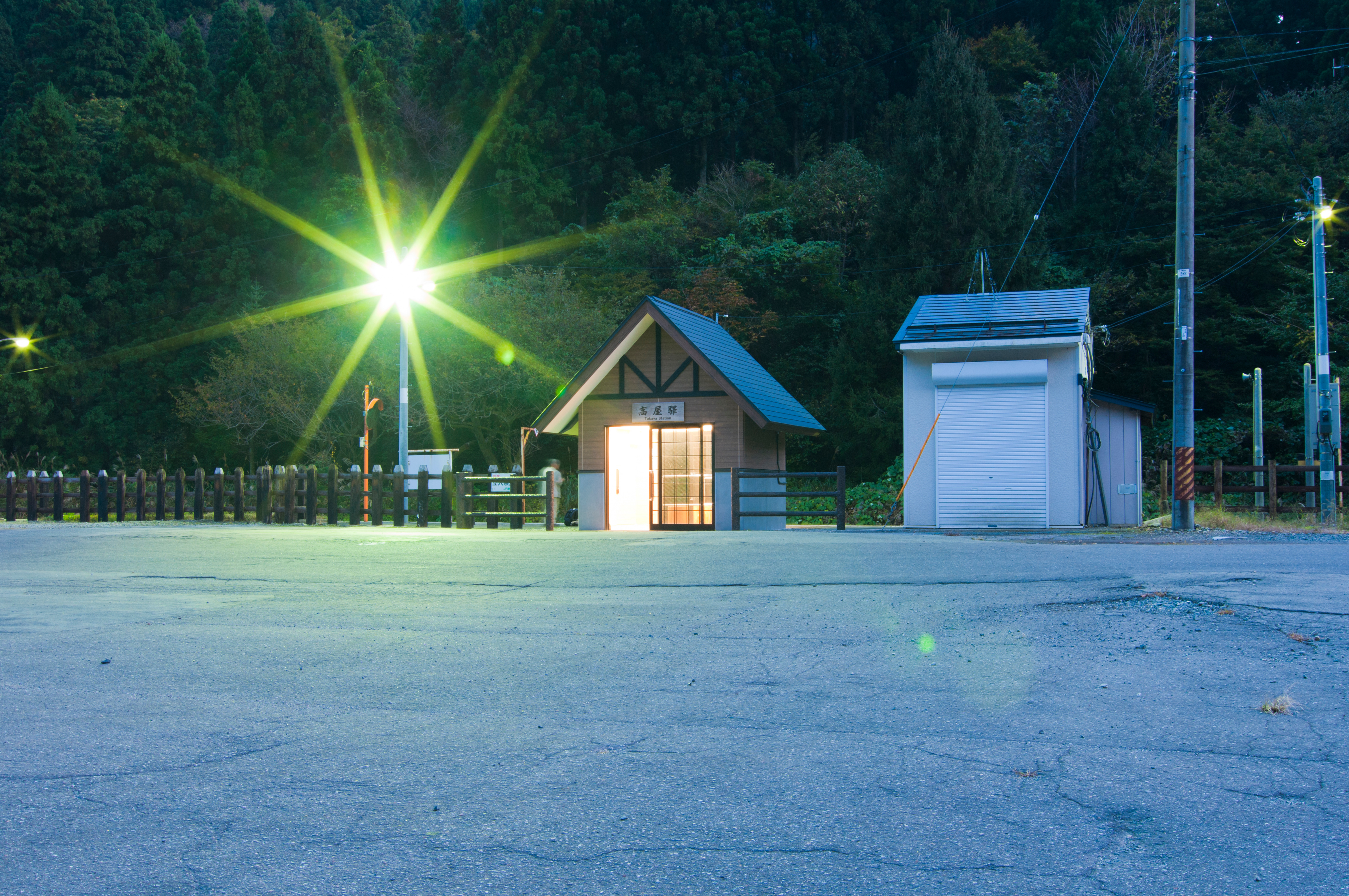 東日本旅客鉄道陸羽西線高屋駅